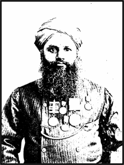 Divi Gopalacharlu (1872-1920)